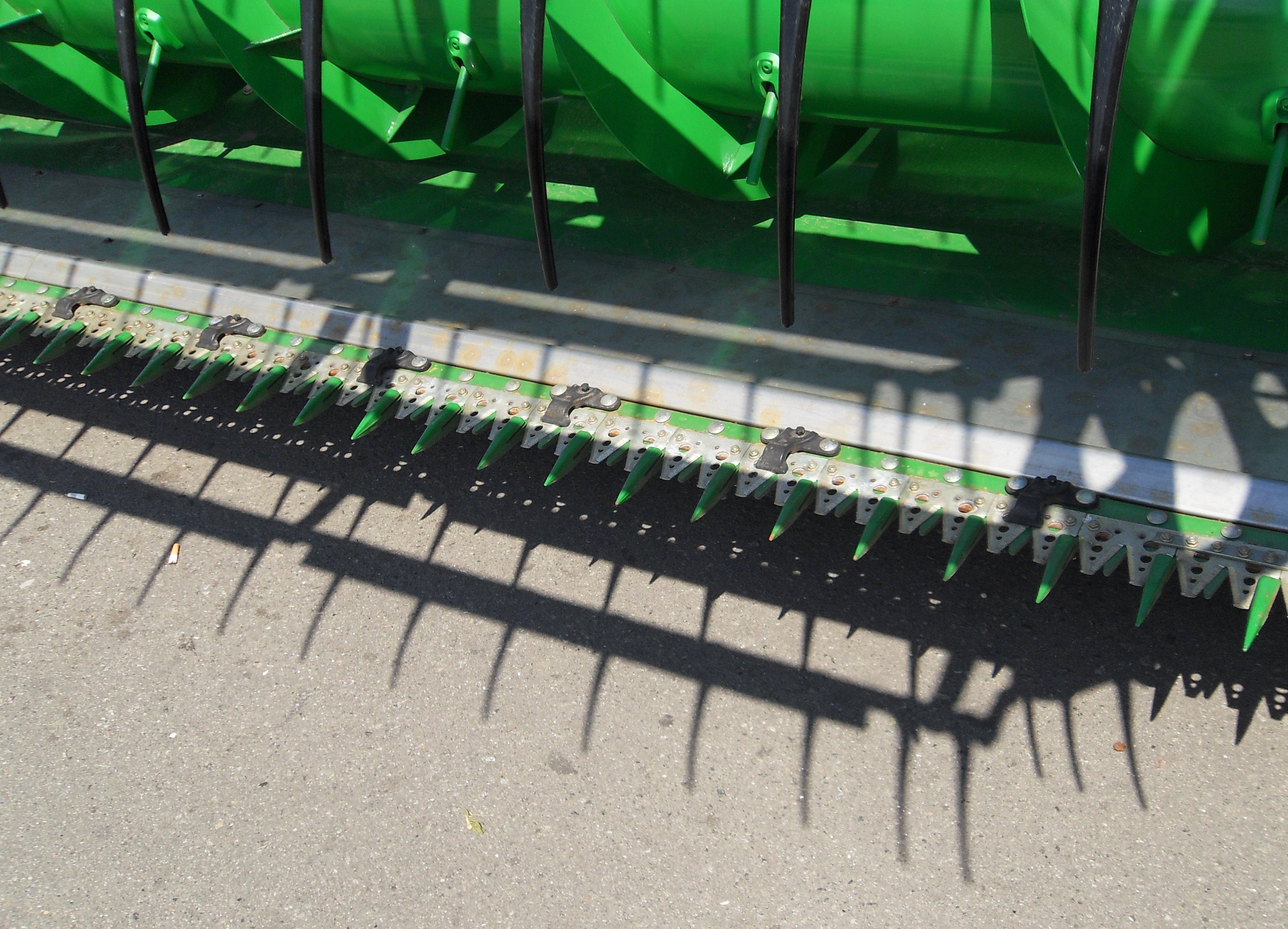 Жатка зернозбирального комбайна